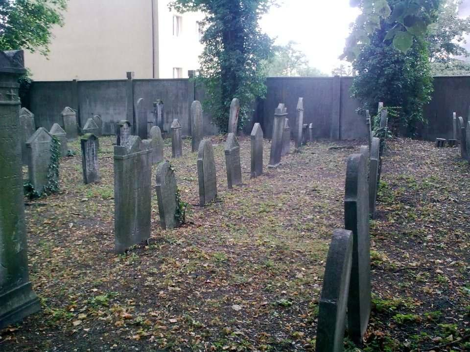 Macewy na cmentarzu żydowskim w Opolu